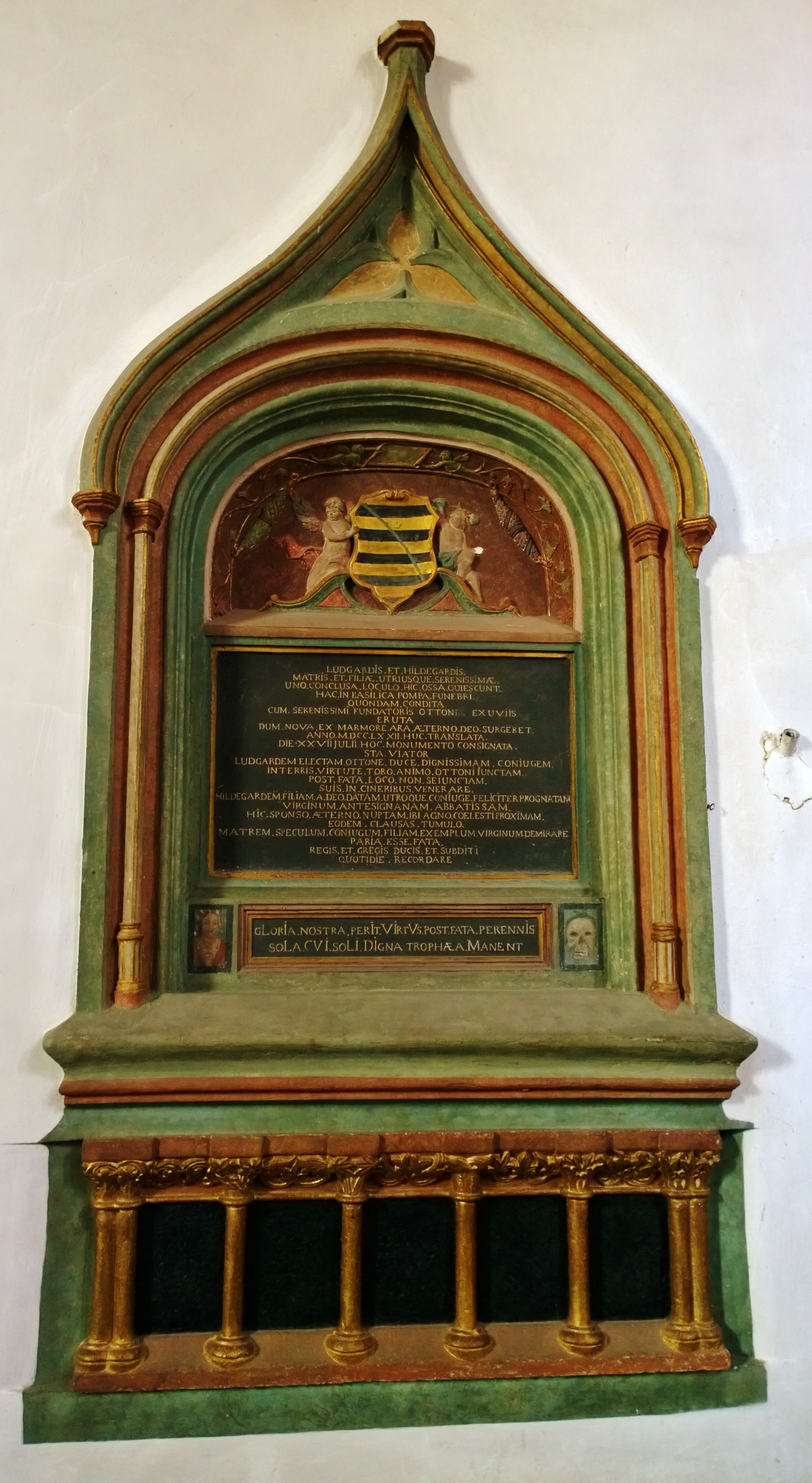 iutgard von Sachsen (* um 845; † 30. November 885[4] in Aschaffenburg) wurde am 26. November 874 in Aschaffenburg die Gemahlin des ostfränkischen Königs Ludwig III. Sie war die Tochter sächsischen Grafen Liudolf (* 805–820, † 866) und dessen Gemahlin Oda Billung (* 805–806, † 913). Aschaffenburg erhielt sie als Morgengabe und Witwensitz von ihrem Mann; sie wurde in der Stiftskirche beisetzt. Später wurden die Gebeine ihrer Tochter Hildegard (879–899), Nonne (Äbtssin) im Kloster Frauenchiemsee, dem Sarkophag beigelegt. Nordseite des Chores, Sarkophag mit Epitaph, 1772 --- Die Grabanlage wurde 1772 der gegenüberliegenden von 1524 angepasst.